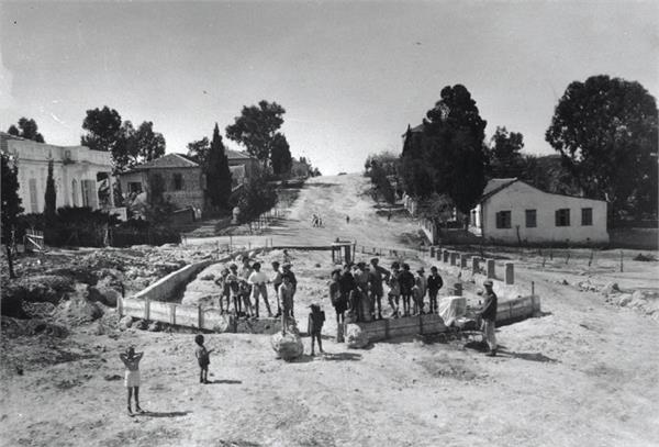 גדרה - מראה המושבה